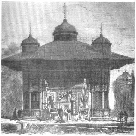 Rekonstruktion des Osmanischen Ahmed-Brunnens aus Konstantinopel von der Wiener Weltausstellung 1873